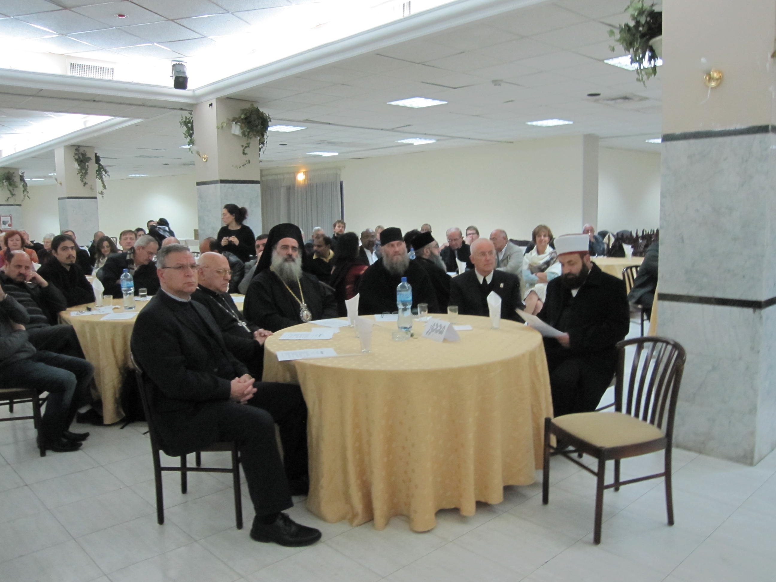 Zestig vertegenwoordigers van de Kairos-beweging, uit vijftien verschillende landen en van verschillende kerken, hebben in Bethlehem op 10 december 2011 een dringende oproep gedaan, dat een rechtvaardige oplossing voor het conflict tussen Israël en de Palestijnen geen uitstel meer kan verdragen: “Geen onrecht meer. Hier staan wij. Sta ons bij.”. De oproep werd gesteund door alle belangrijke kerkleiders in het Heilige Land, waaronder ook moslimleiders.